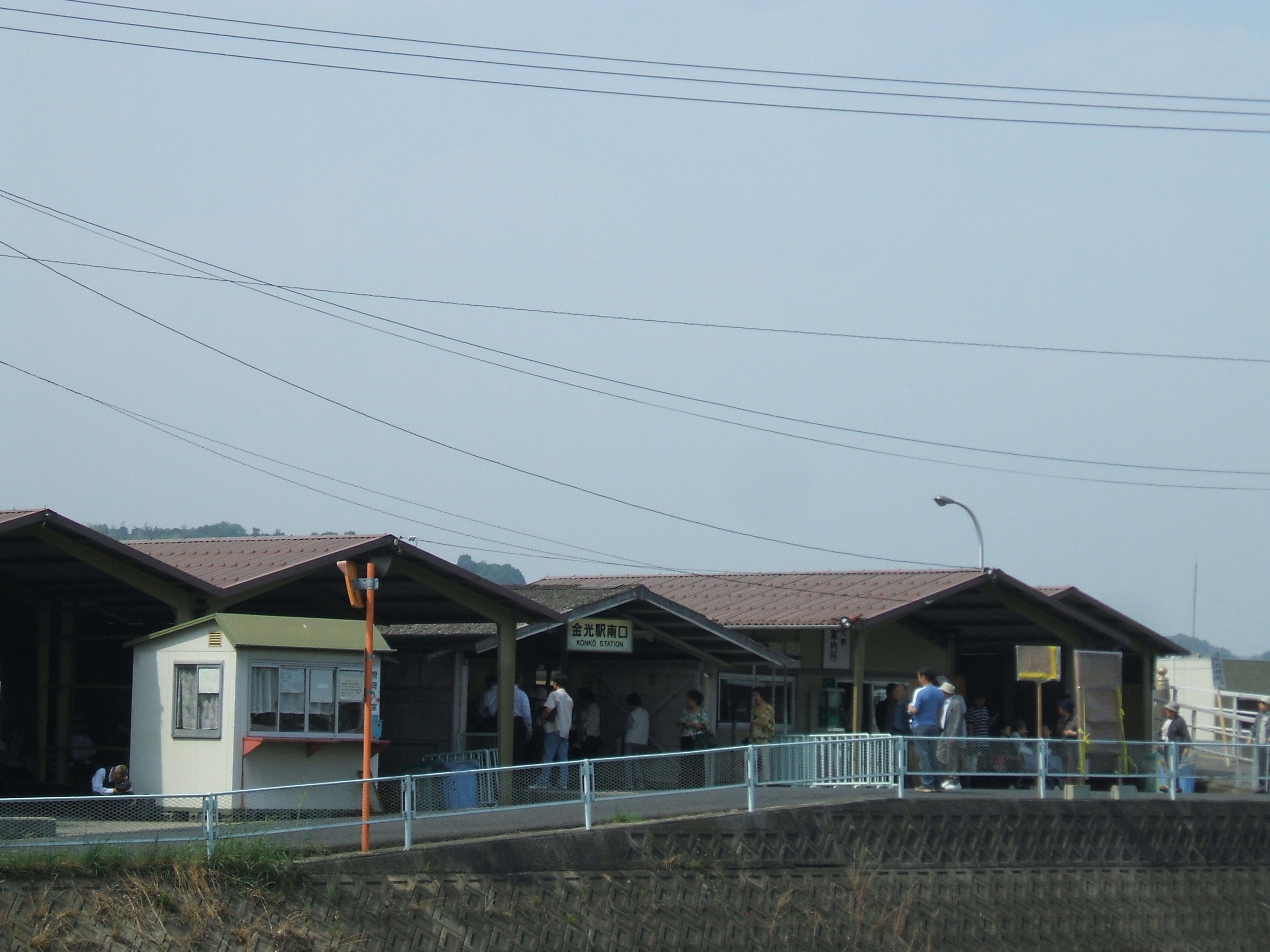 岡山県浅口市金光町にある山陽本線金光駅南口の外観